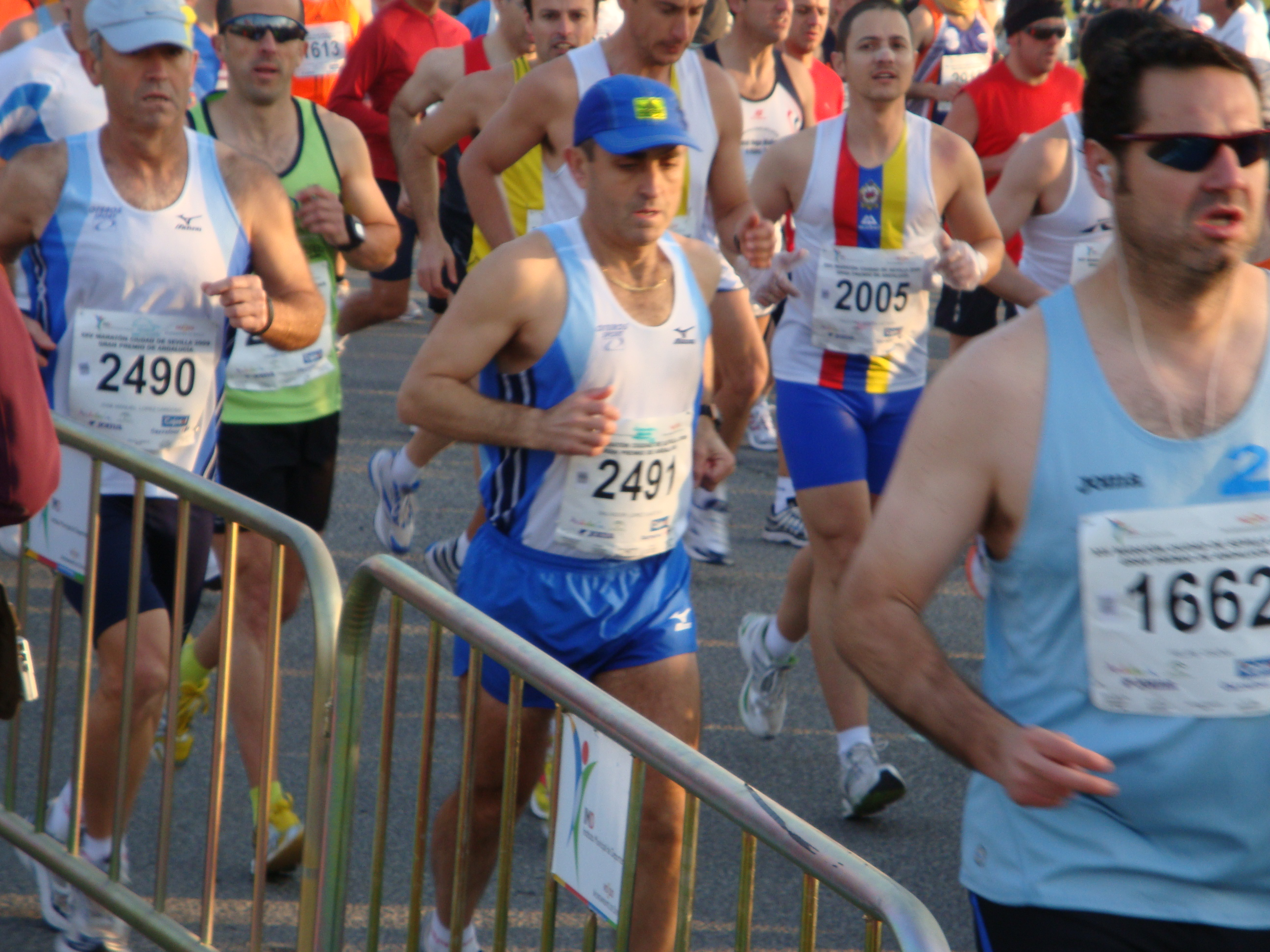 Corredores de la Maratón Ciudad de Sevilla (2009)